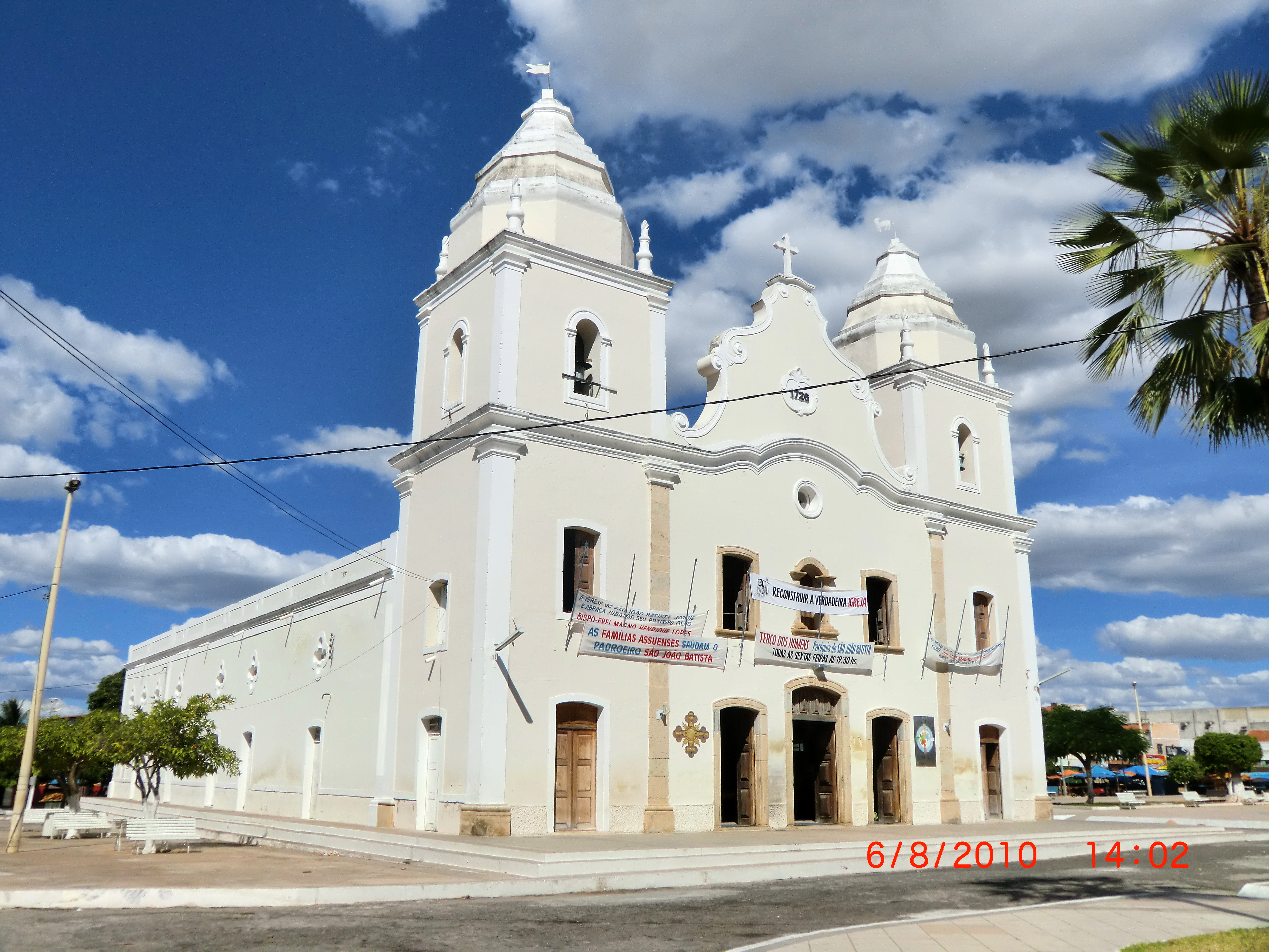 Igreja-Matriz de Açu (RN) - Paróquia de São João Batista (24/6)